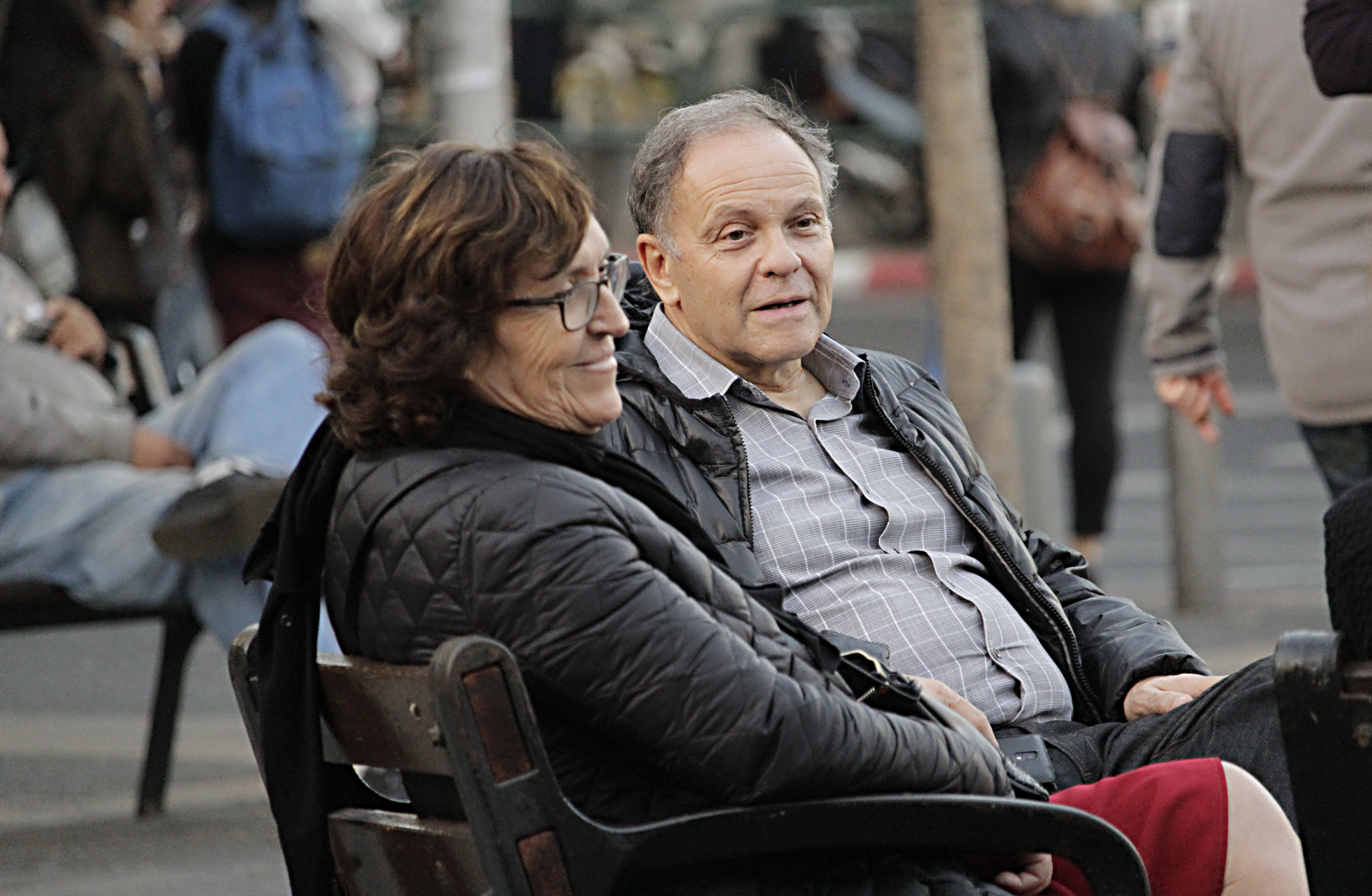 זוגיות רז אמיגה תיכון רוטברג